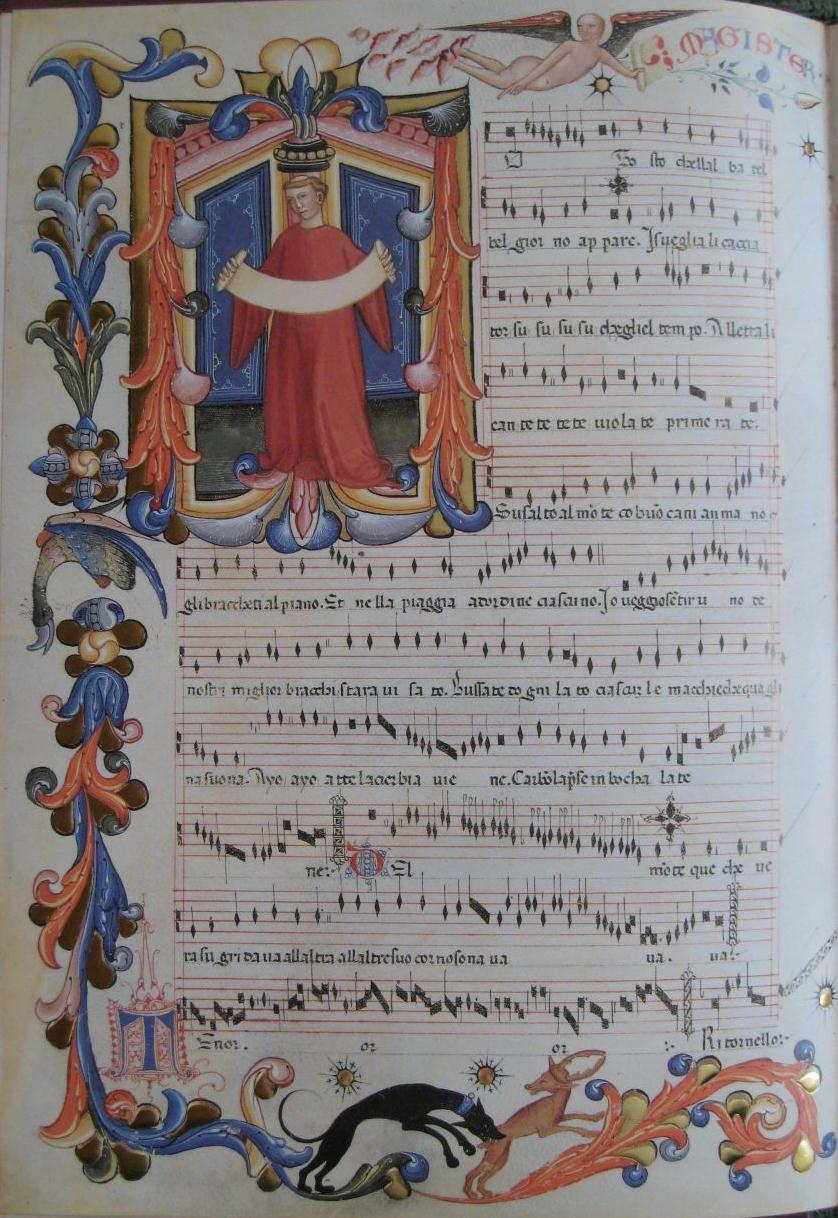 Tosto che l'alba, Codex Squarcialupi